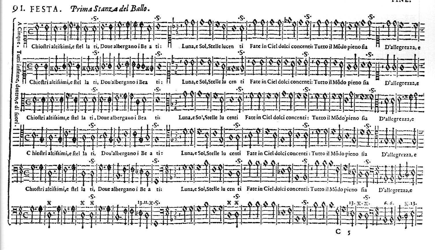 Le finale intitulé Festa, du premier opéra/oratorio de « La Rappresentatione di anima e di corpo » d'Emilio de' Cavalieri (1600). La partition porte pour la première fois la basse chiffrée.